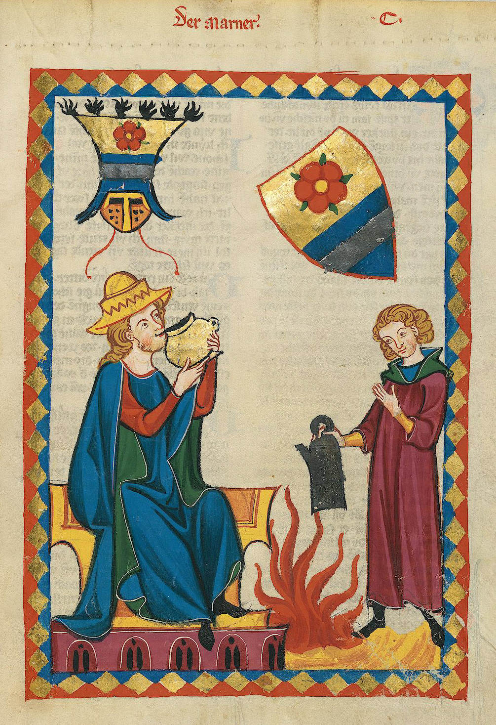 Codex Manesse, UB Heidelberg, Cod. Pal. germ. 848, fol. 349r, Der Marner